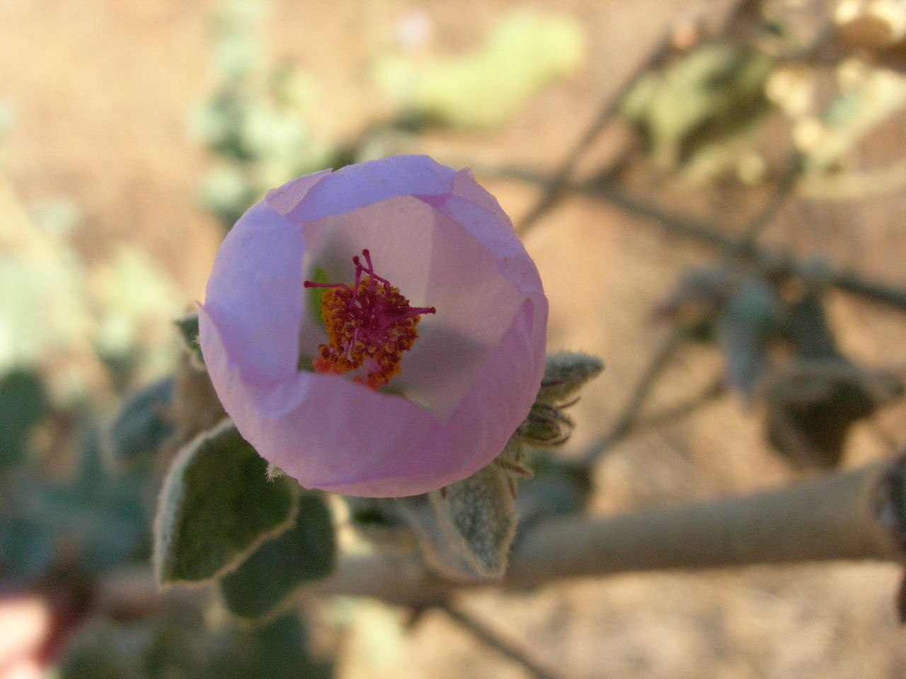 pix 001